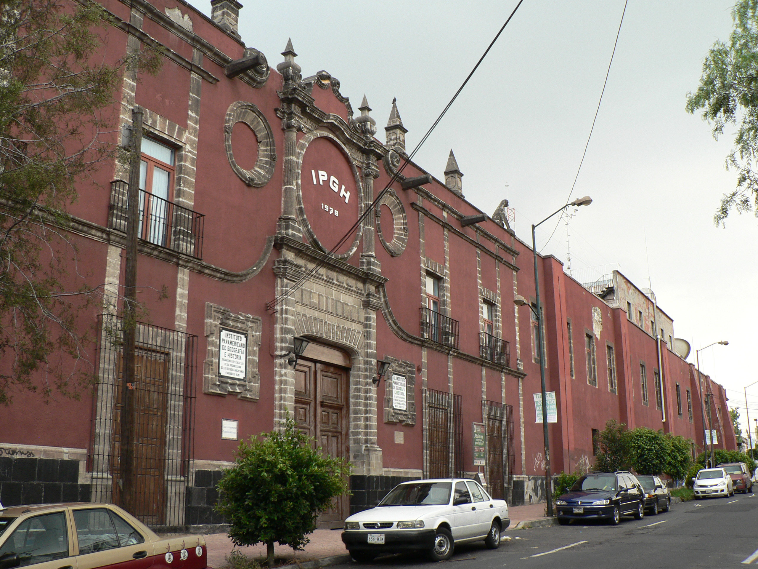 Fué construido en 1737 por orden del Virrey Don Juan Antonio Vizarrón y Eguiarreta, Arzobispo de México y se destinó a albergar al Arzobispado de aquella época.Actualmente es compartido por el servicio meteorologico nacional y el instituto panamericano de geografía e historia